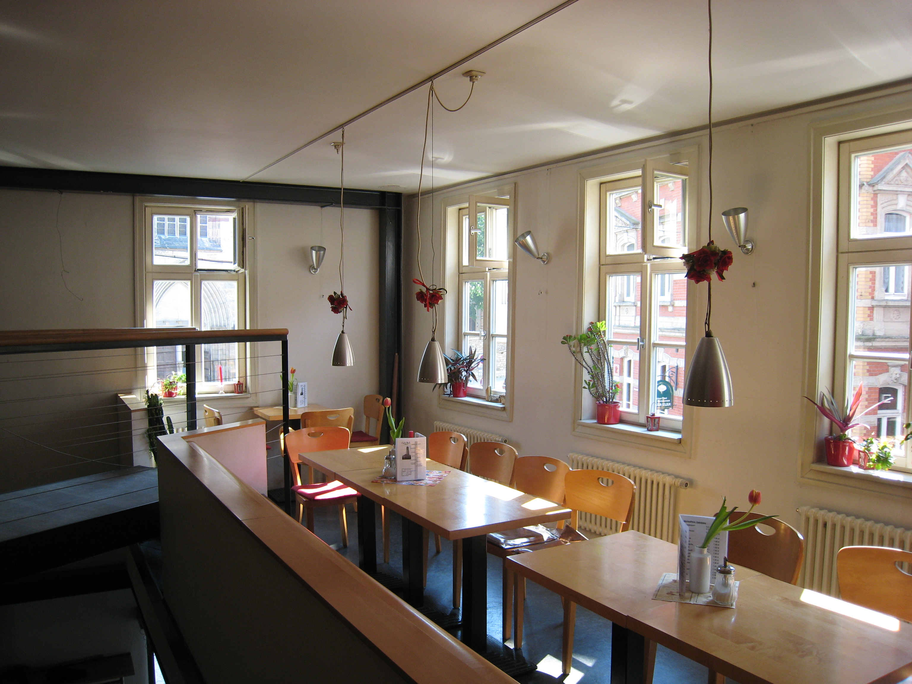 Das Kaffeehaus Paul in der Innenstadt von Erfurt, Paulstraße 11